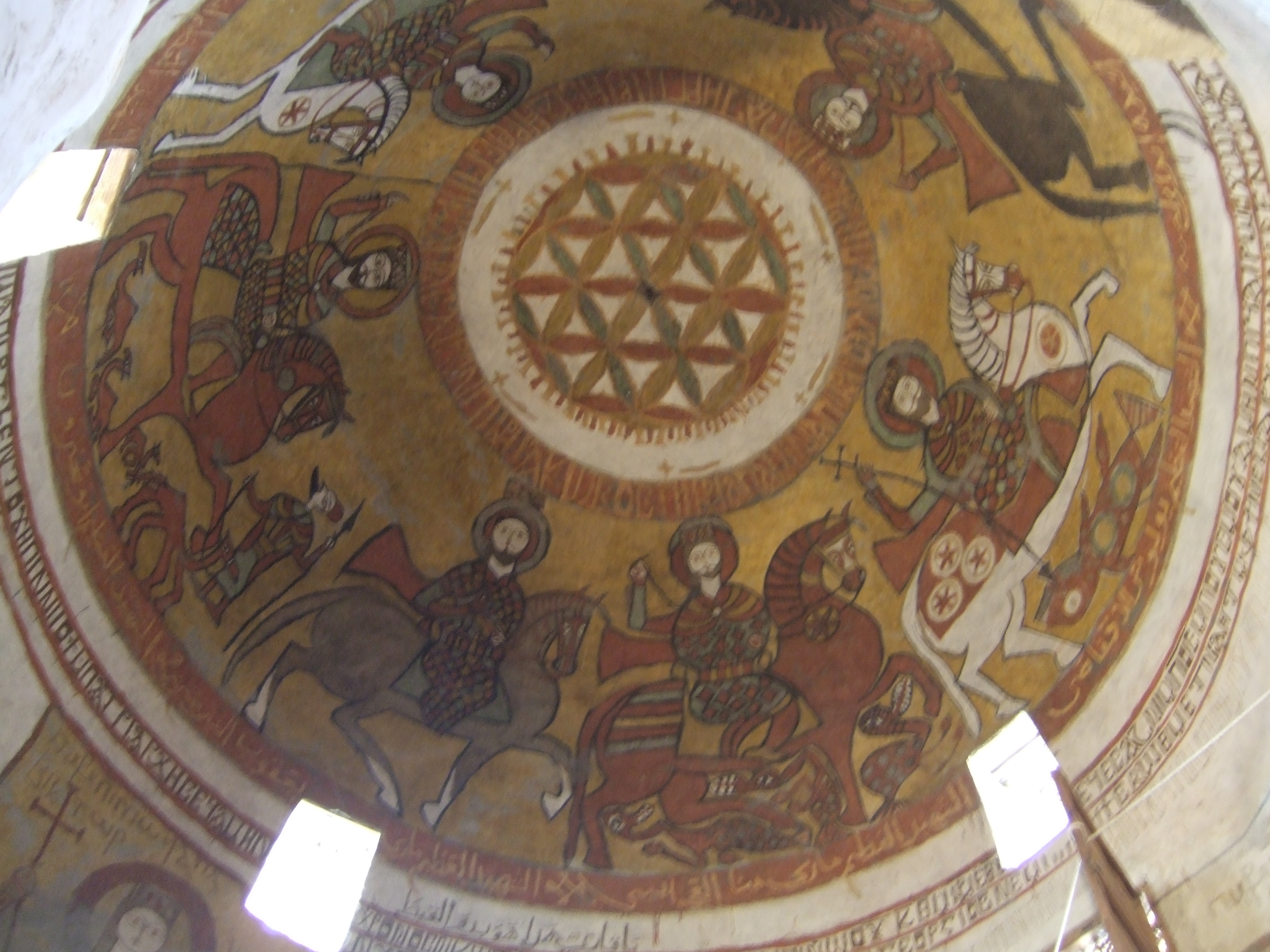 Foto LR - 2007